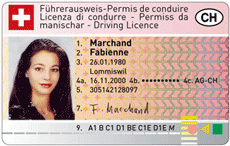 Permis Suisse